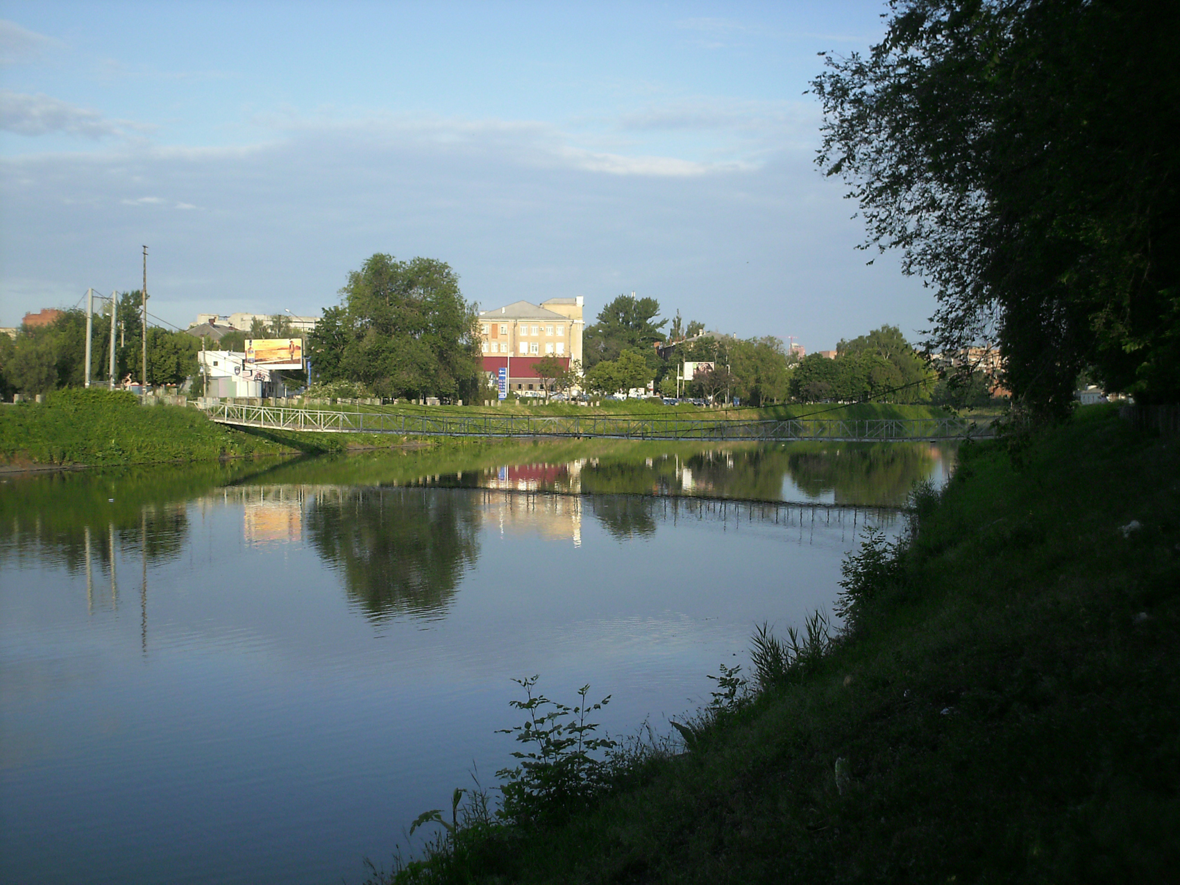 Река Харьков по течению. Старый Рыбный подвесной пешеходный мост (демонтирован перед Днем города 23 августа 2010) у Лопанской стрелки. Вид с правого берега на левый по течению. Автор Артёмка